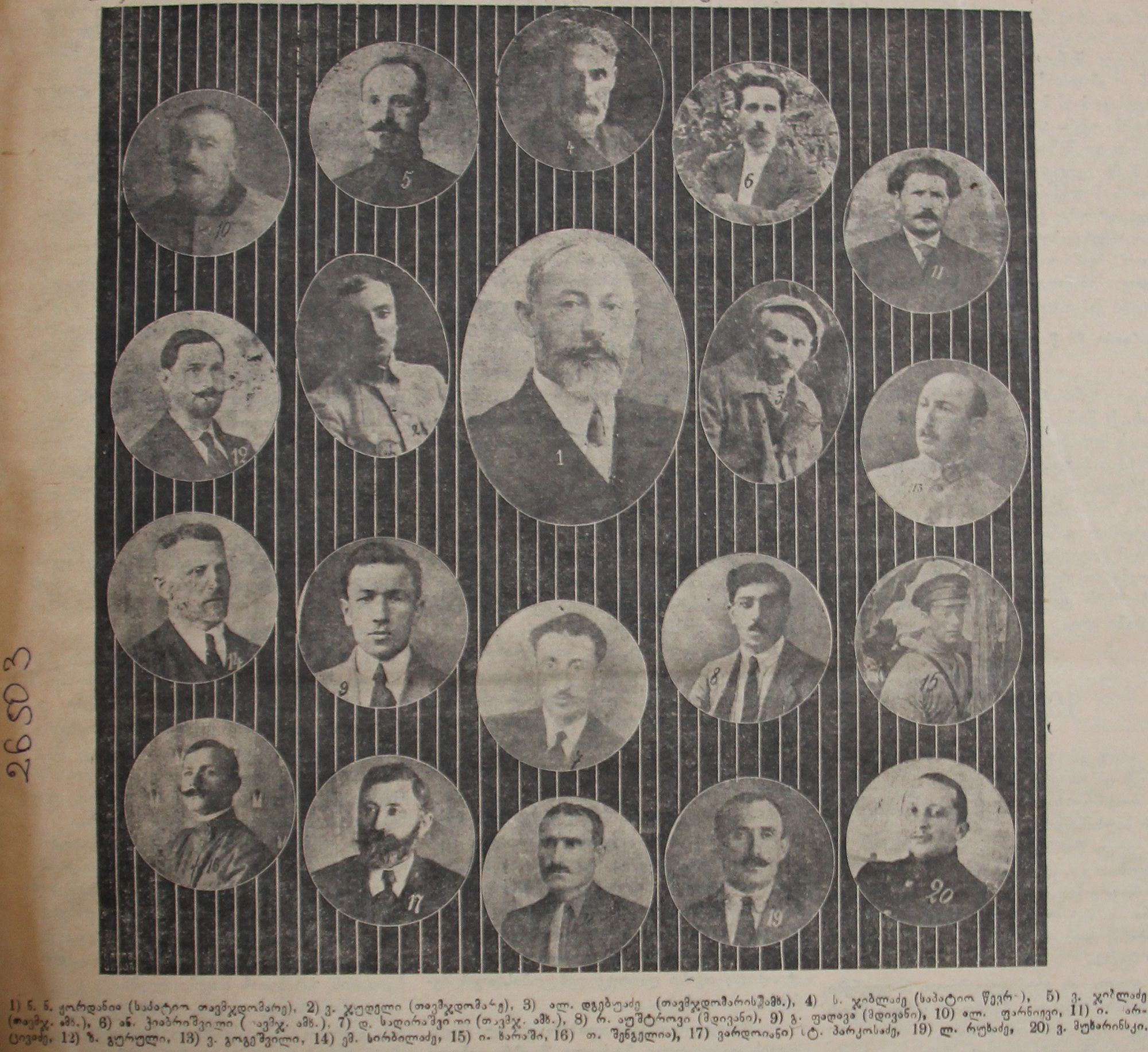 სახალხო გვარდიის მთავარი შტაბი, 1920 წ.